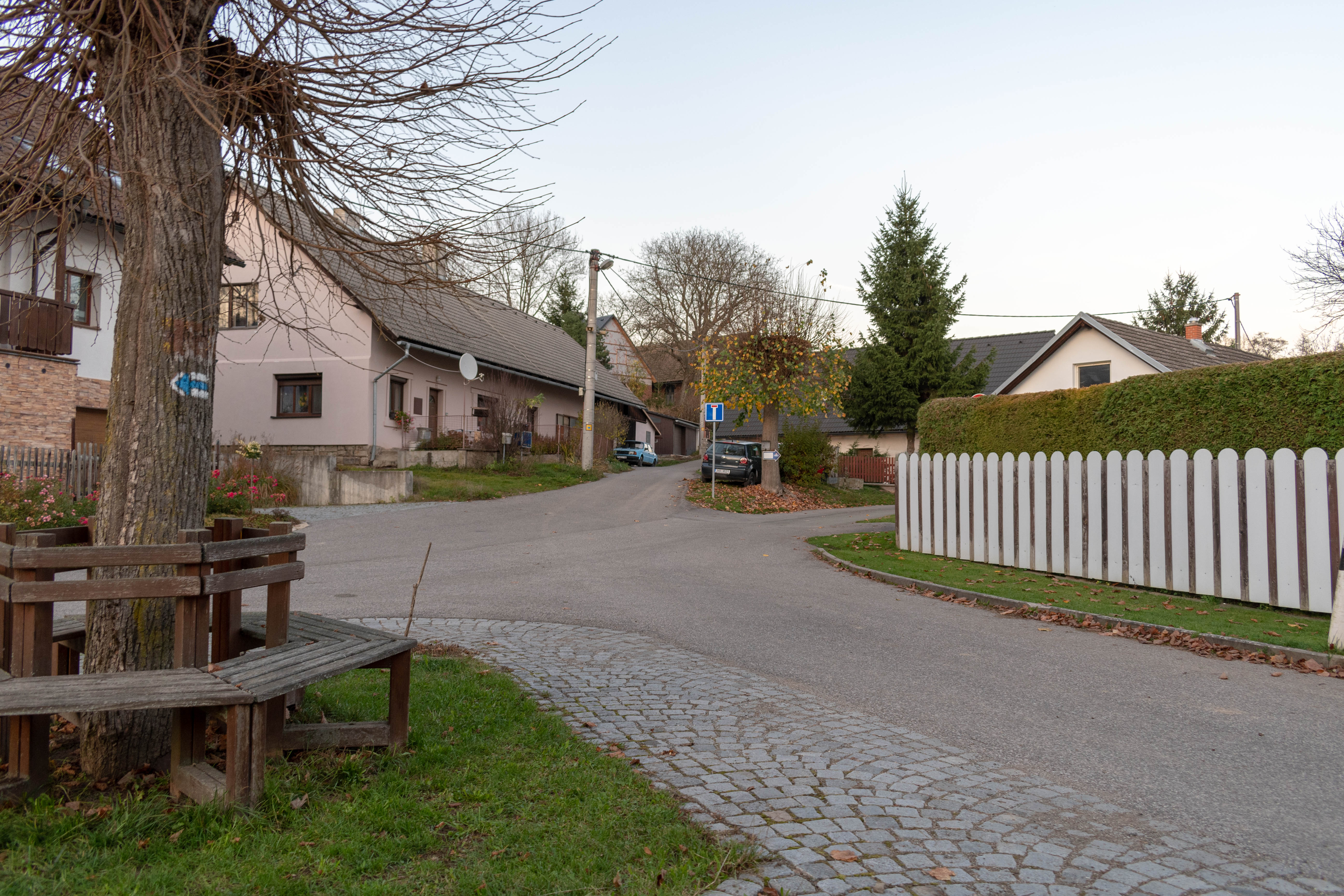 Celkový pohled na obec Třtice